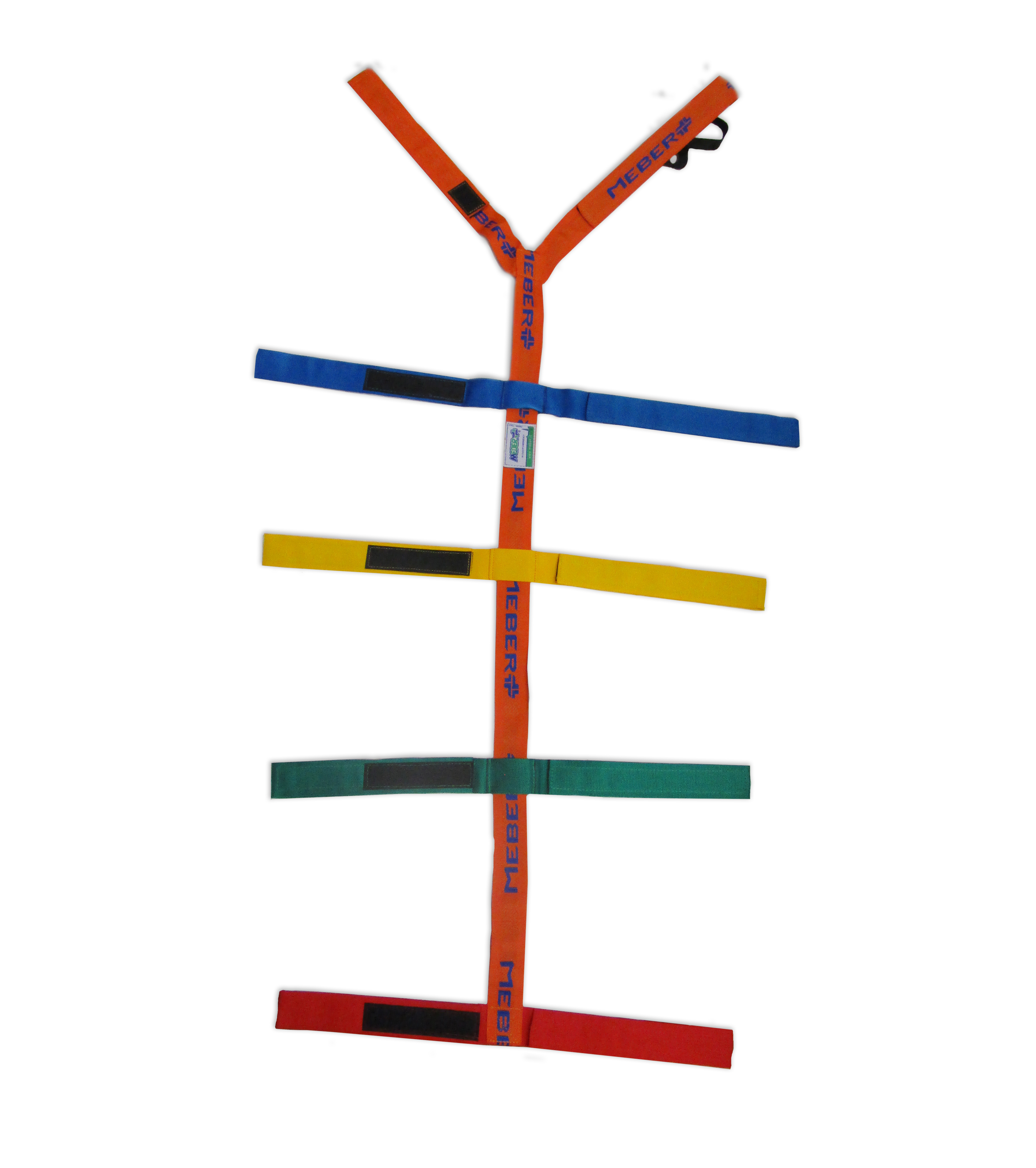 Cinture di immobilizzazione per spinale